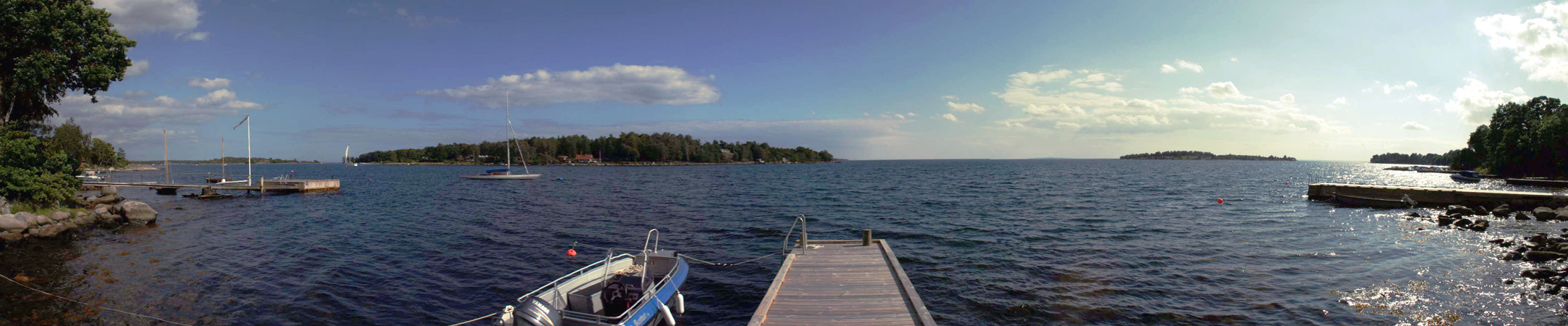 Del av Hällaryds skärgård sedd från Sv:Matvik. På bilden syns Västra Bokö (t.v.) och Nastensö (t.h.)